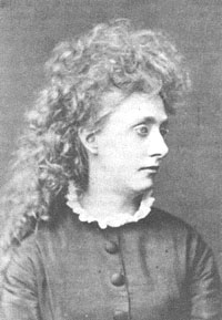 M.E. Baart, uit: J. Brouwers, Twee verwoeste levens. De levensloop en de dubbelzelfmoord van Elize Baart (1854-1897) en Bastiaan Korteweg (1849-1879) (Amsterdam 1993)